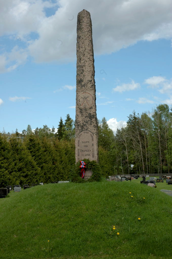 Minnestøtte over falne soldater ved Trangen i 1809